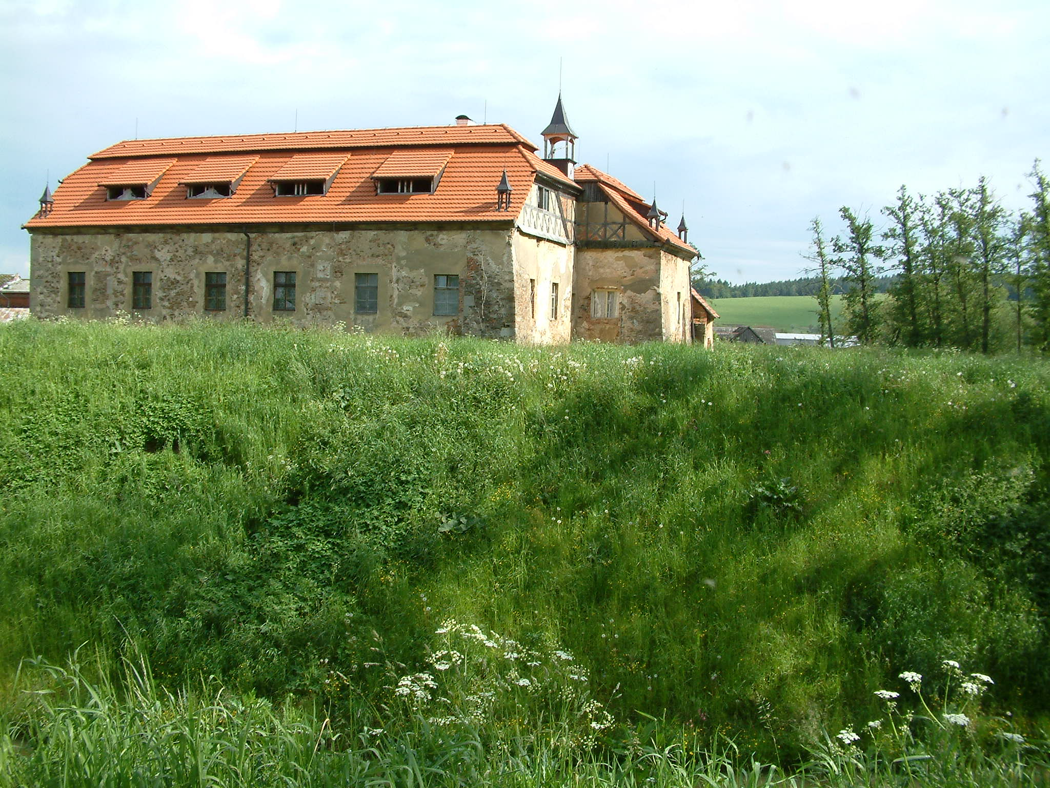 2.Tvrz Vlkošov 6.6.2004